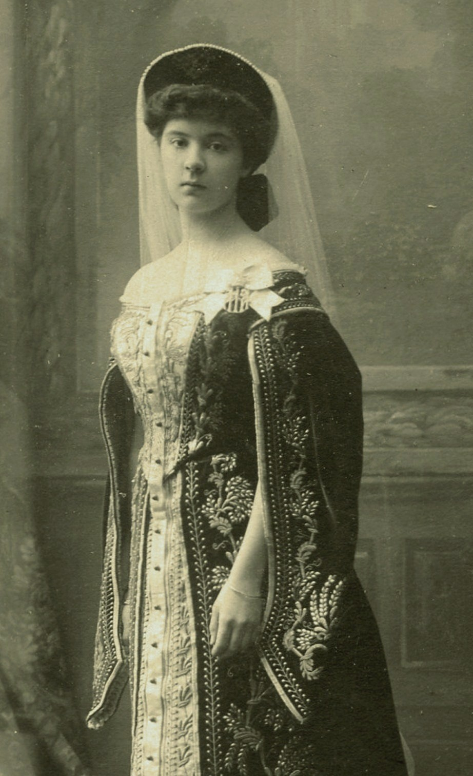 Ольга Николаевна Звегинцова, с 1914 года жена графа Гендрикова